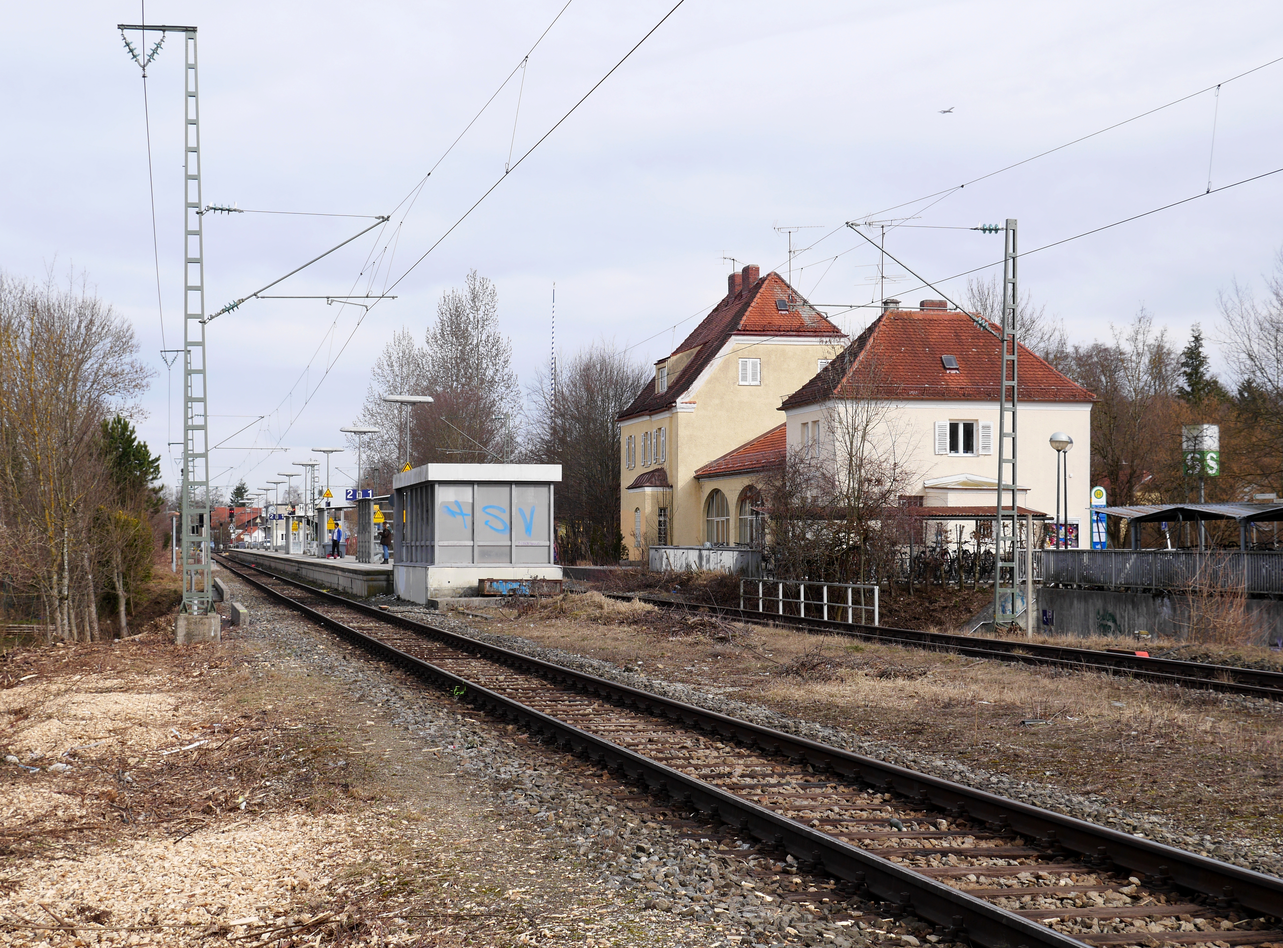 Empfangsgebäude des Bahnhof Weßling (Oberbay) von der Gleisseite und Mittelbahnsteig, Blick aus Richtung Westen